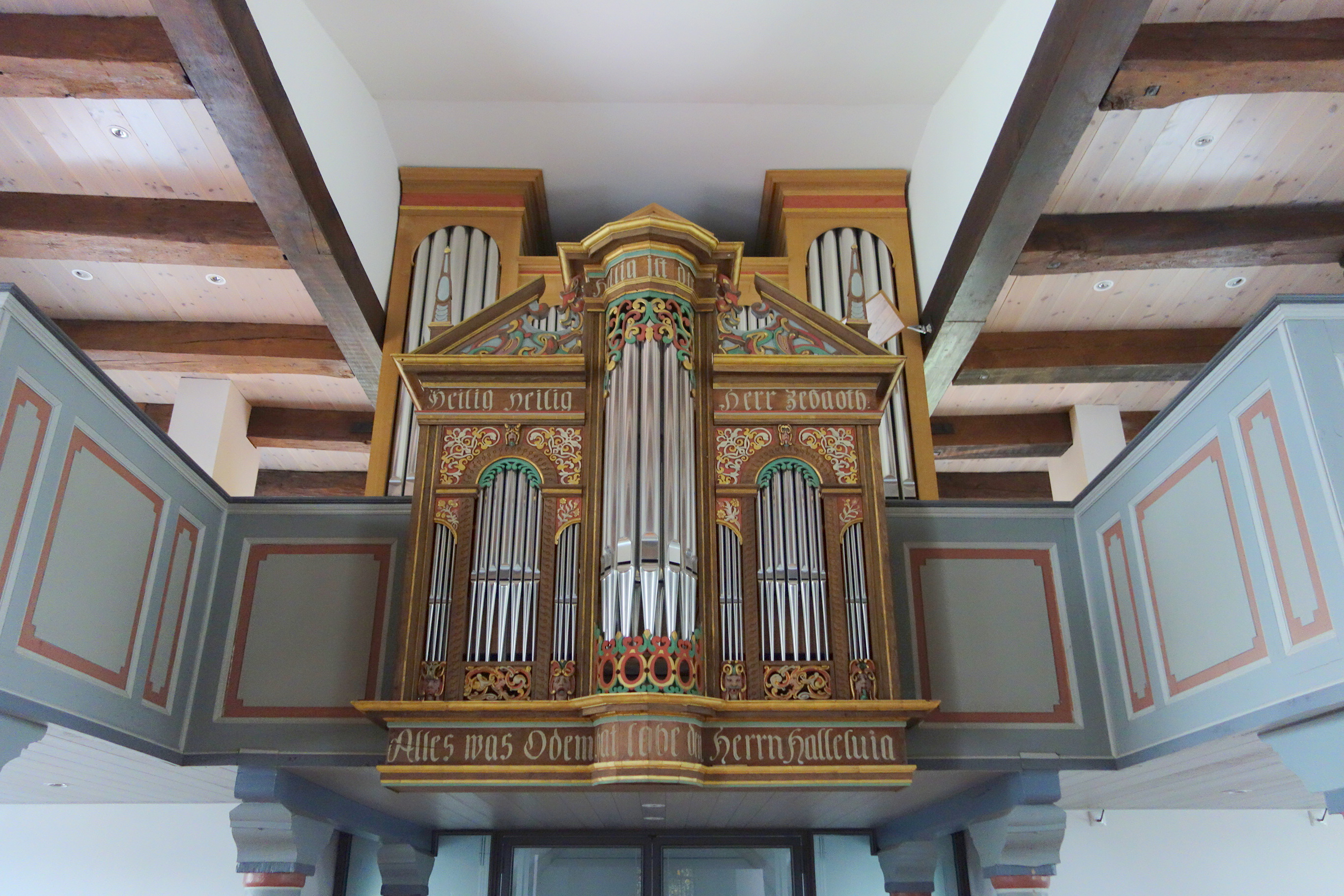 Orgel der Matthias-Claudius-Kirche Reinfeld in Schleswig-Holstein, Deutschland